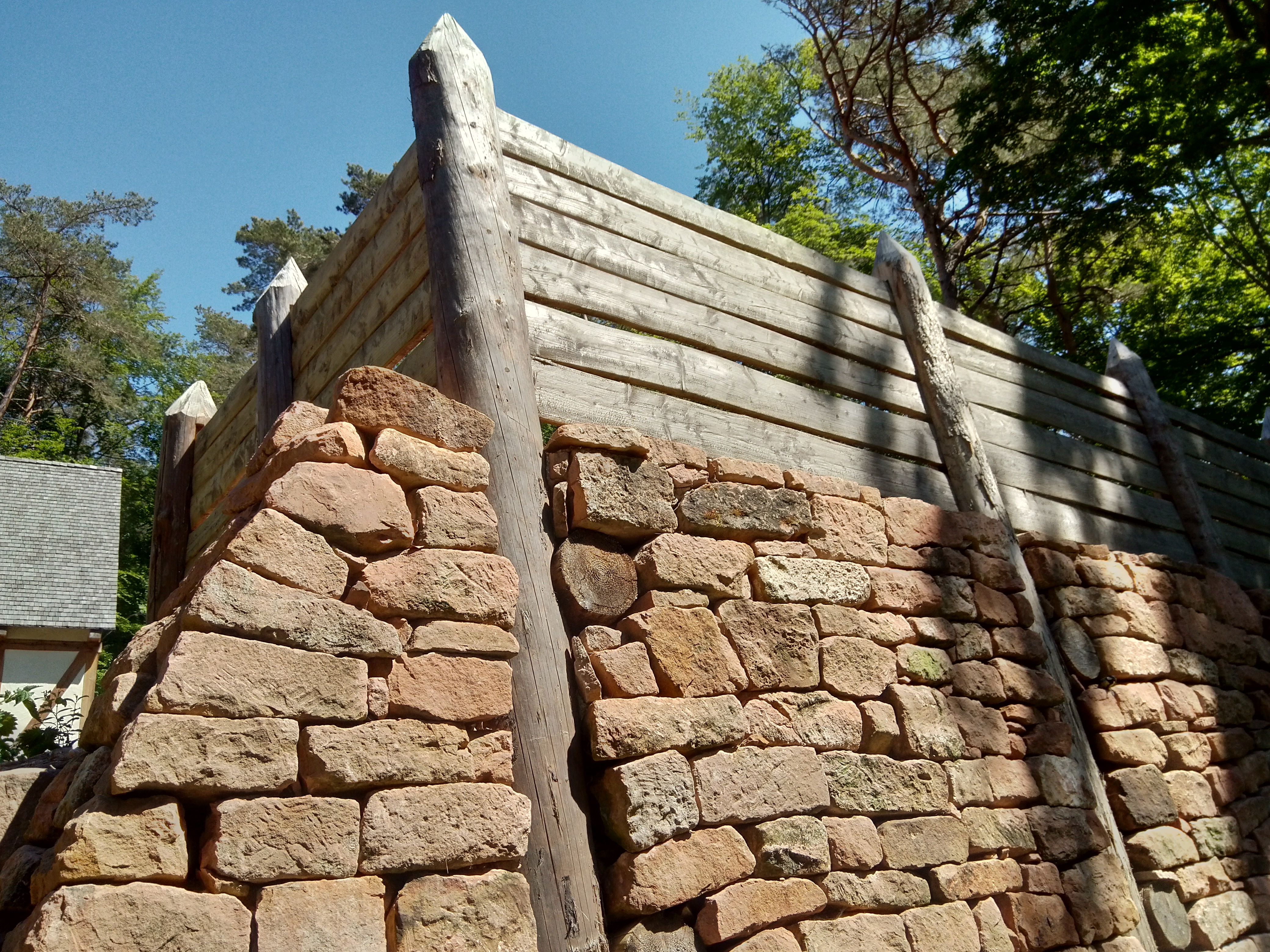 Nachbau einer Pfostenschlitzmauer am Ringwall der Altenburg (Spessart)